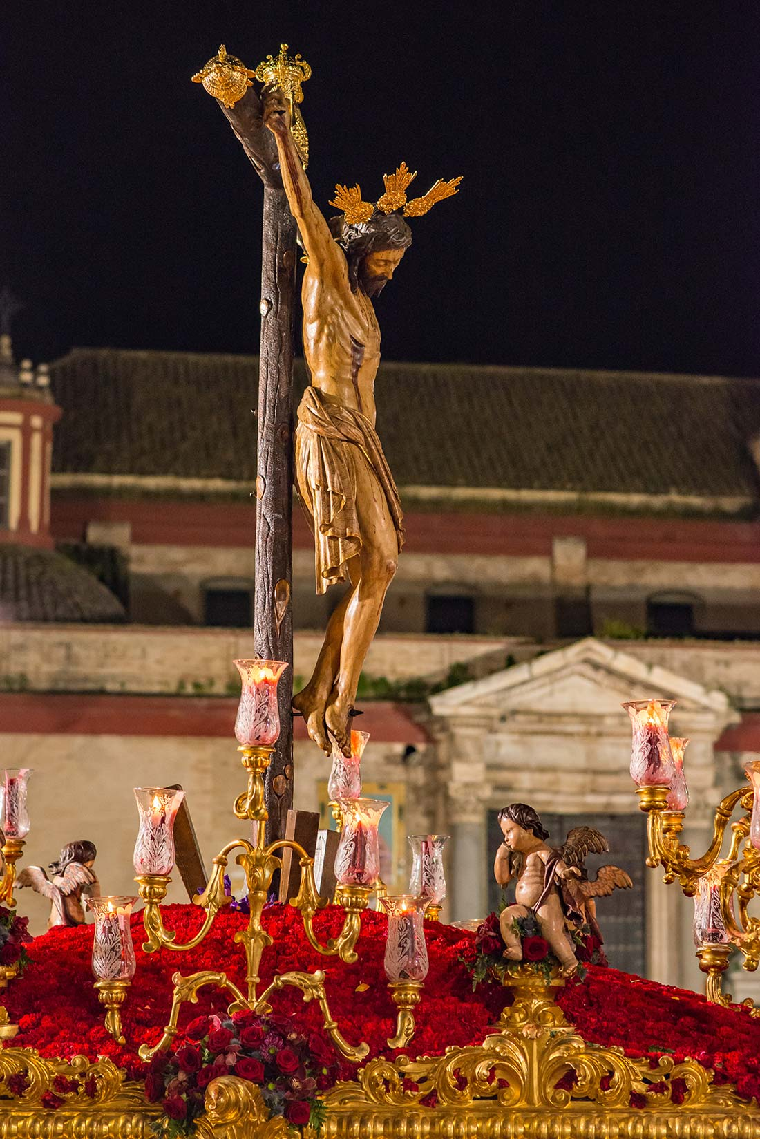 Jornada del Jueves Santo